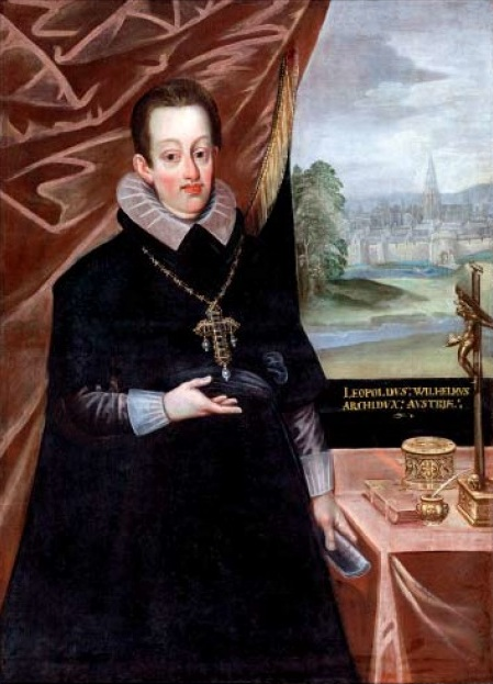 Erzherzog Leopold Wilhelm von Habsburg, jüngster Sohn von Kaiser Ferdinand II.